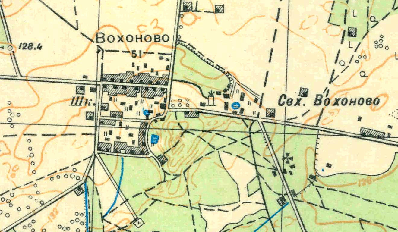 Топографическая карта Ленинградской области, квадрат О-35-24-Б-в (Вохоново), деревня Вохоново